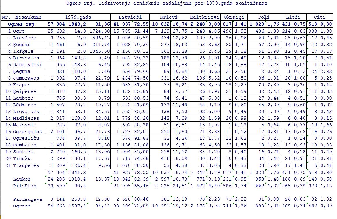 Latvijas 1979. gada tautas skaitīšanas dati